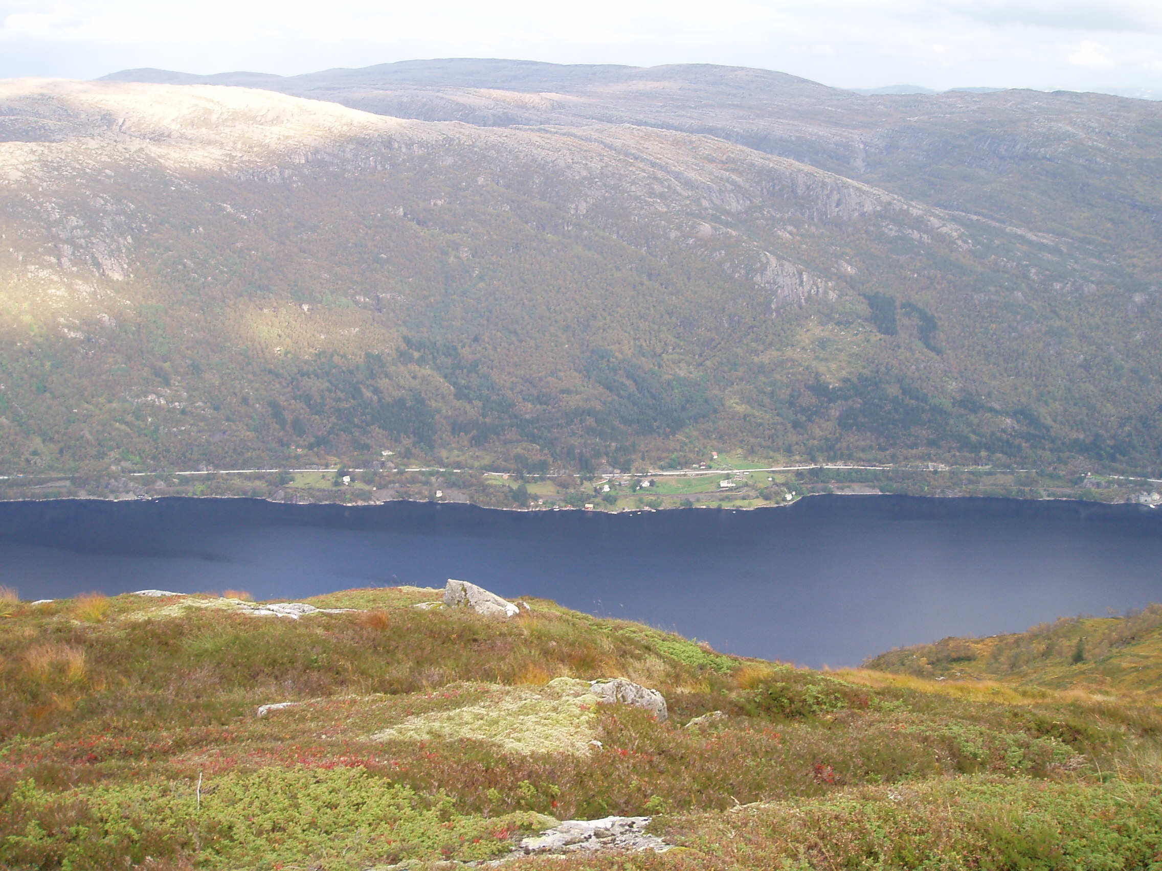 Bilde av Fossmark tatt frå Osterøy/Rispingen